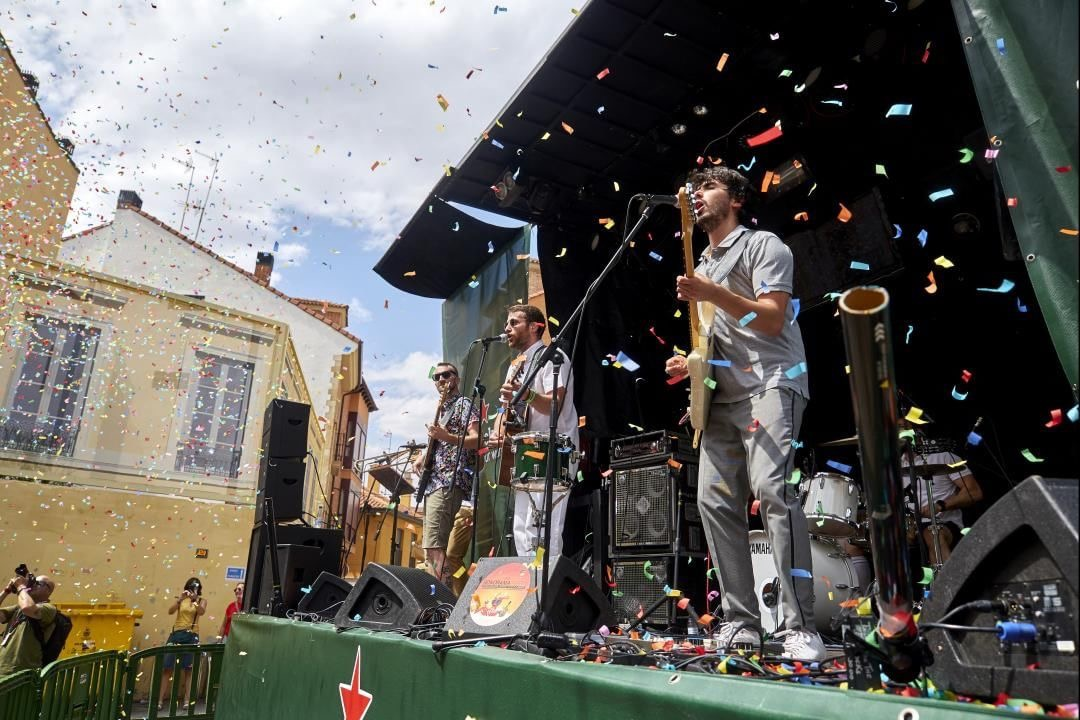 Yogures de Coco en su actuación en el festival Sonorama 2018 (Aranda de Duero) en la Plaza de la Sal.